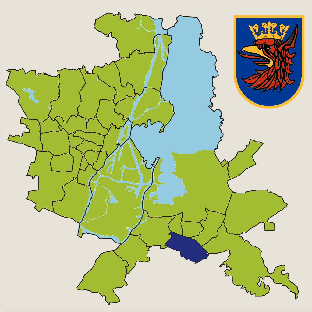 Osiedle "Bukowe-Klęskowo" w Szczecinie – jednostka pomocnicza miasta w 2010